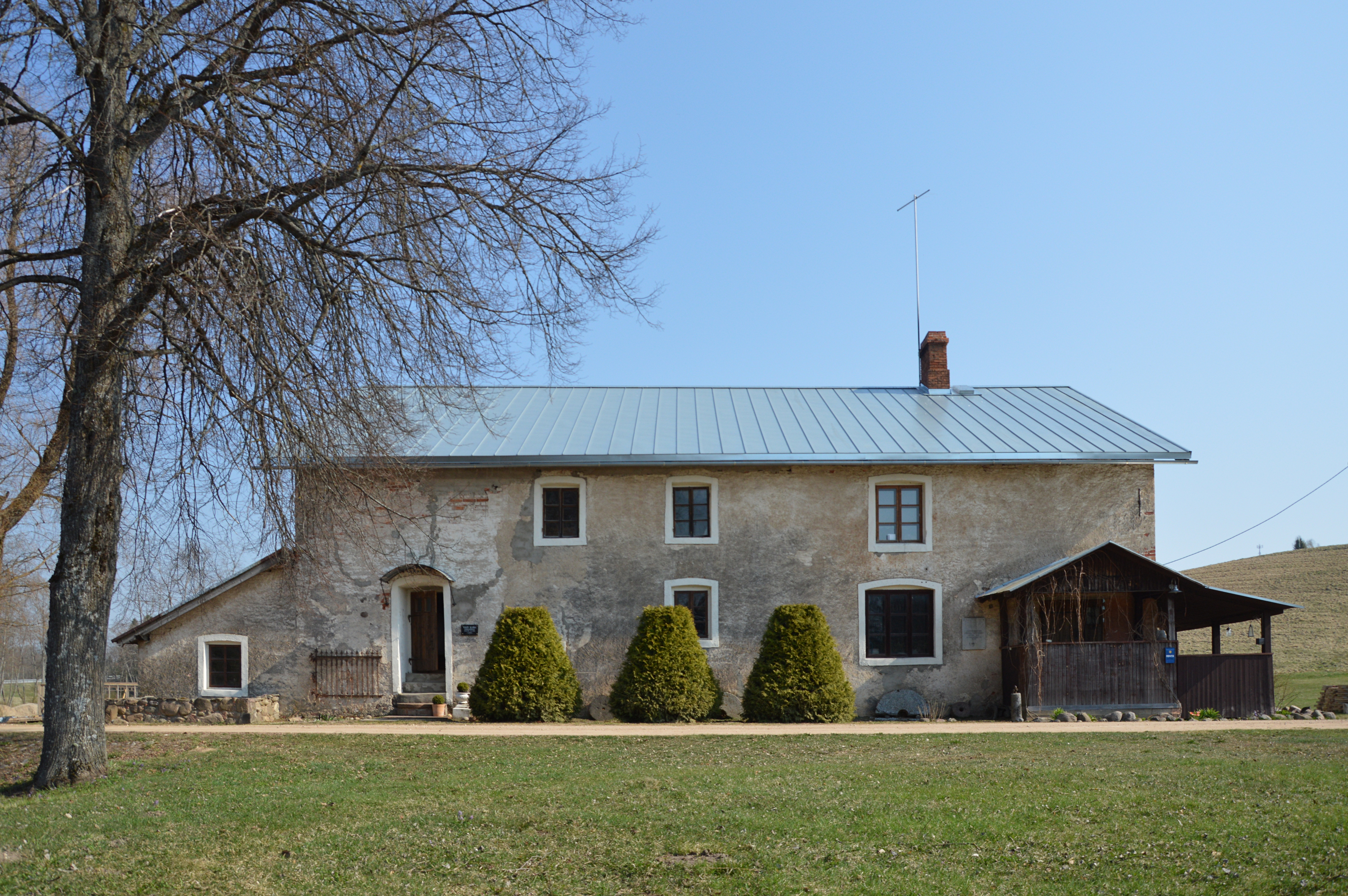 Sänna mäeveski